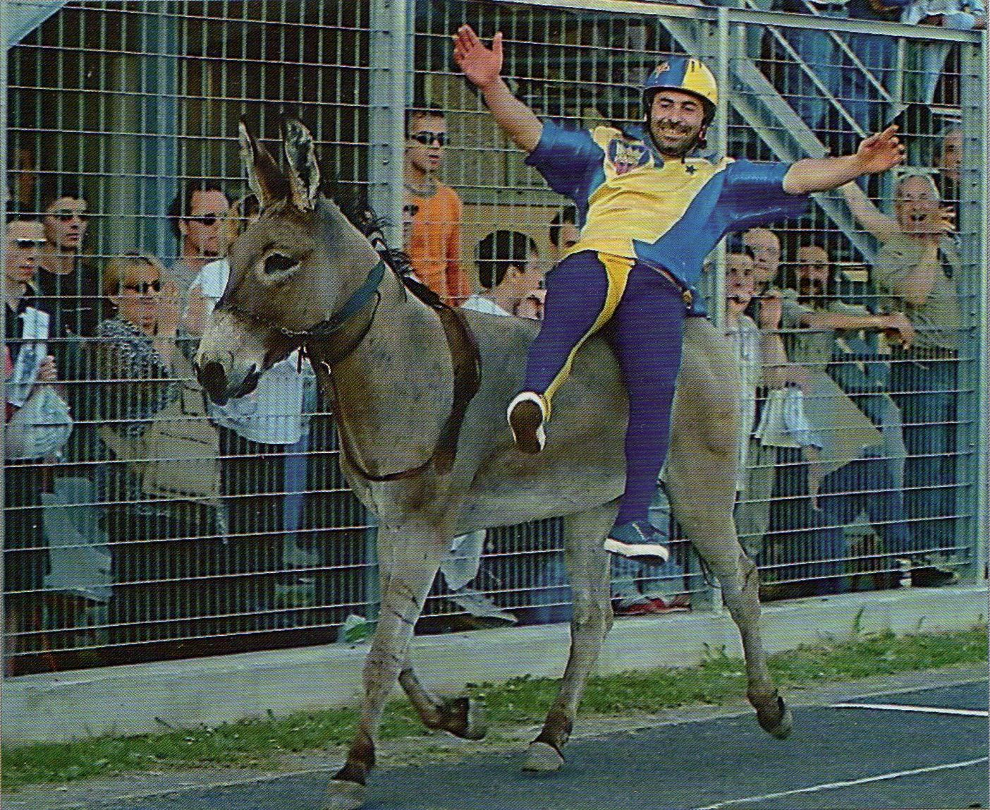 Angelo Oppito e il miccio Merlino vincitori del 48° Palio dei Micci di Querceta per la Contrada La Madonnina